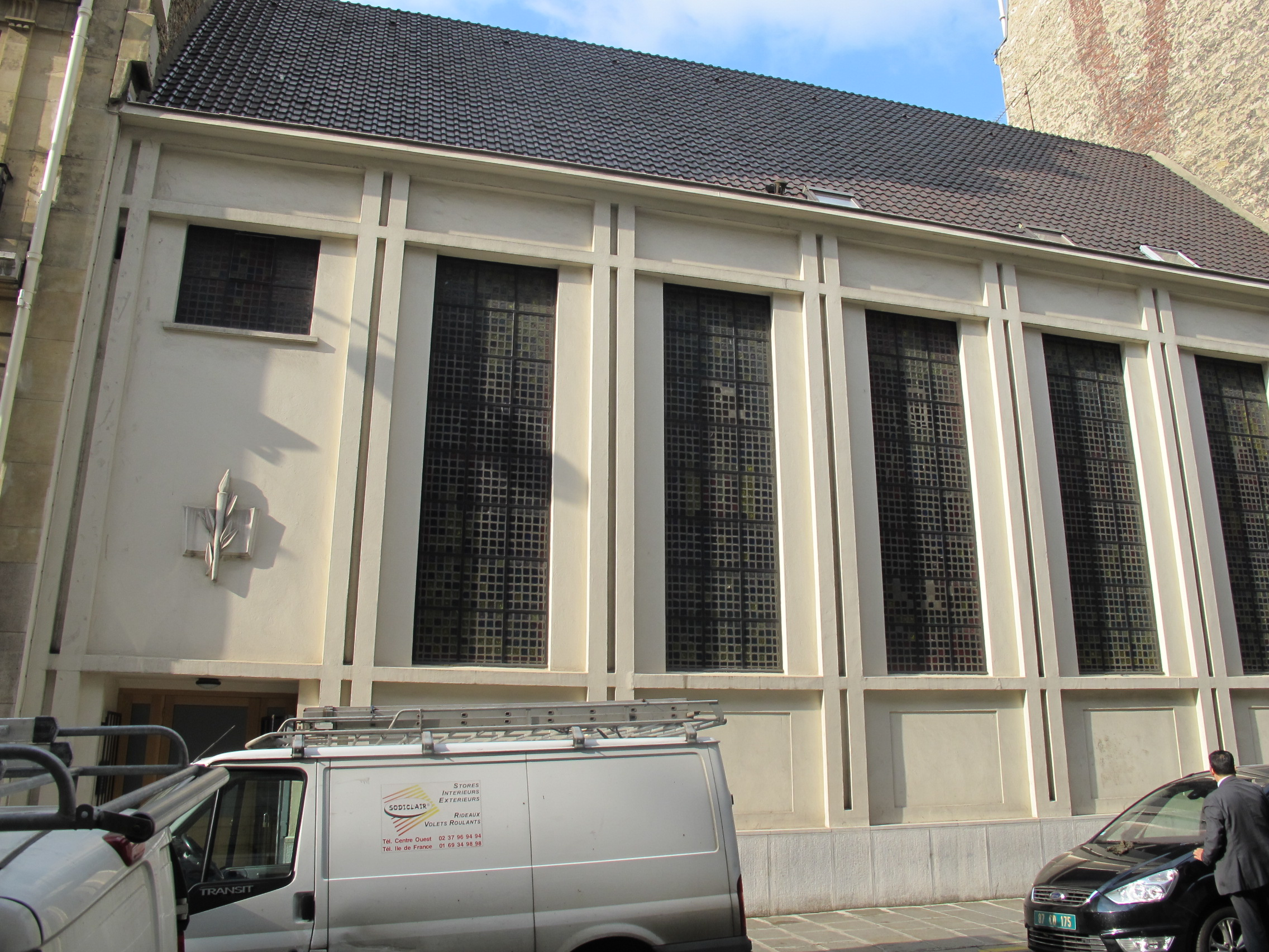 Dánský kostel v Paříži